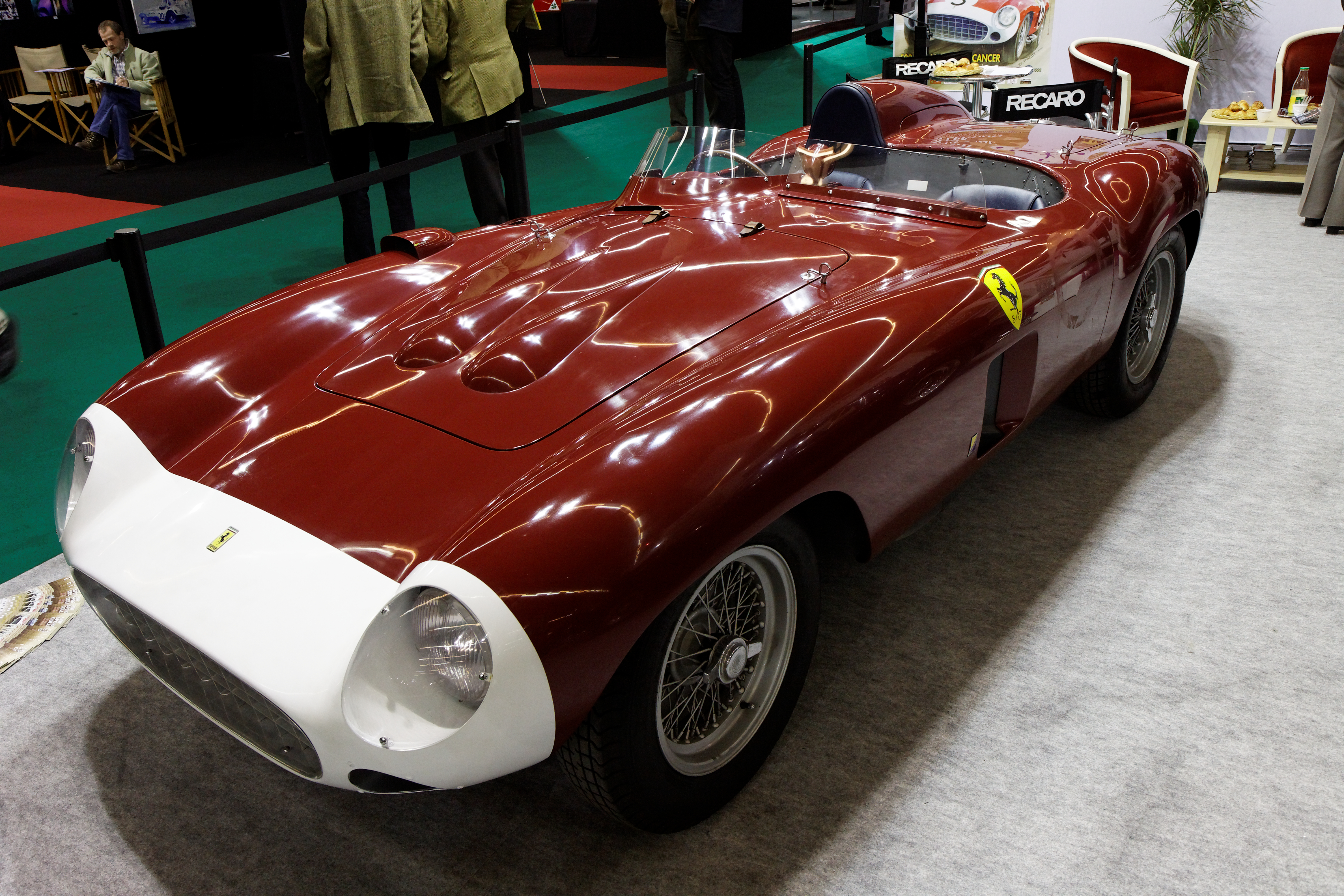 Photographie prise lors du salon rétromobile 2011 à Paris, porte de Versailles.